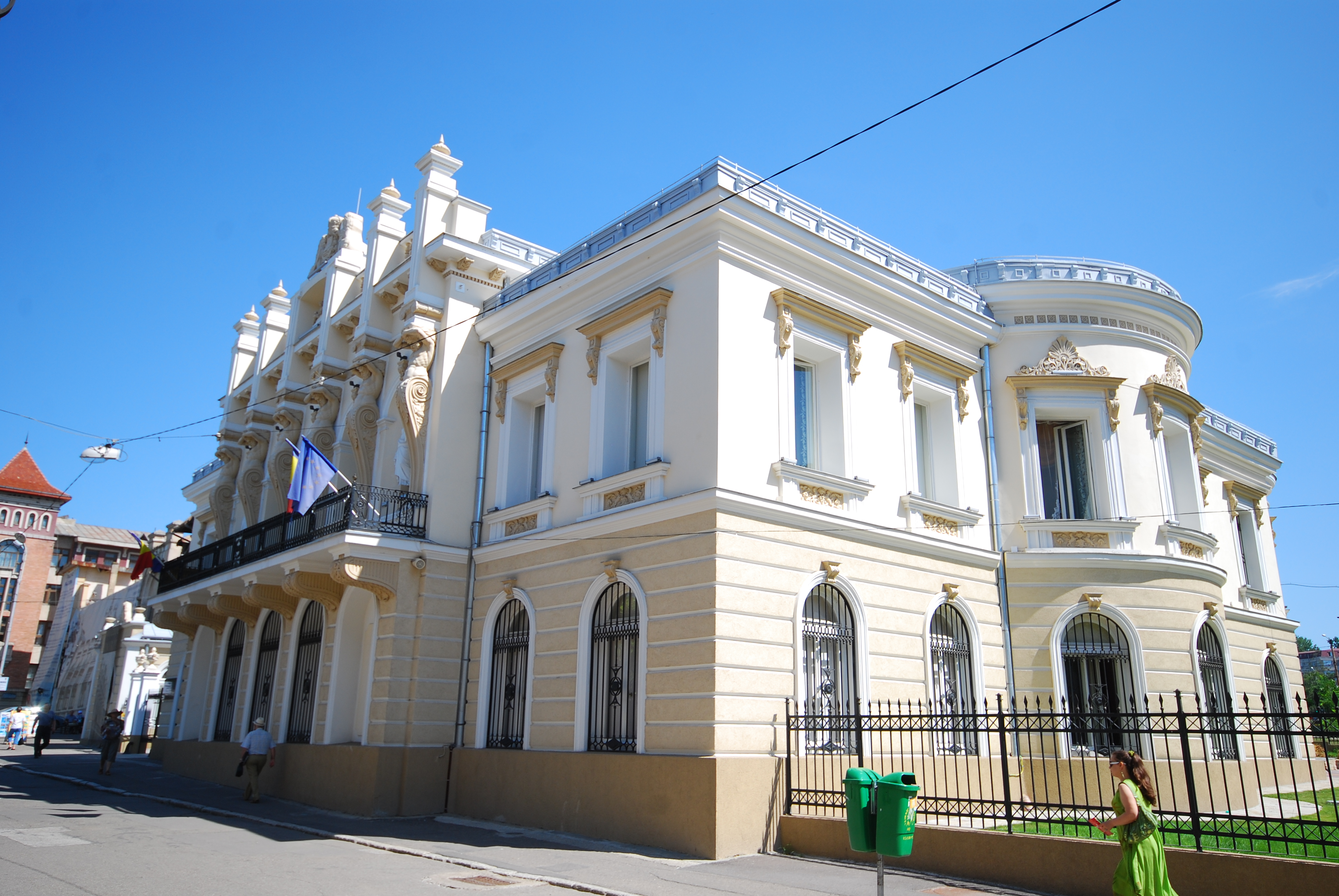 Palatul domnitorului Alexandru Ioan Cuza (azi Muzeul "Unirii" - Complexul Național Muzeal Moldova)